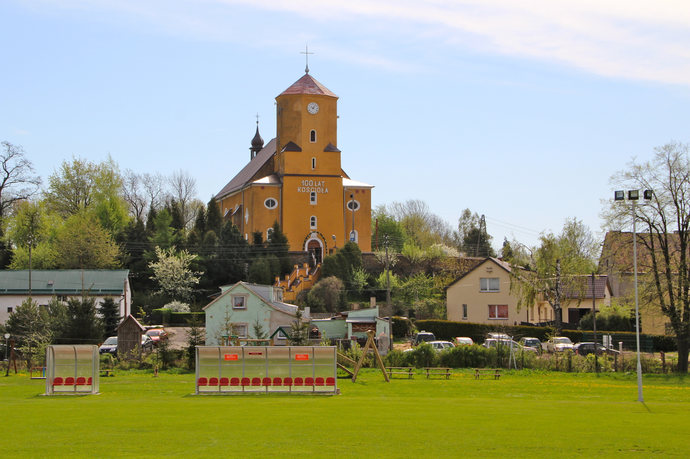 Bogdanowice - zespół kościoła parafialnego p.w. Podwyższenia Krzyża Świętego (zabytek nr A-110/2010 z 15.03.2010).